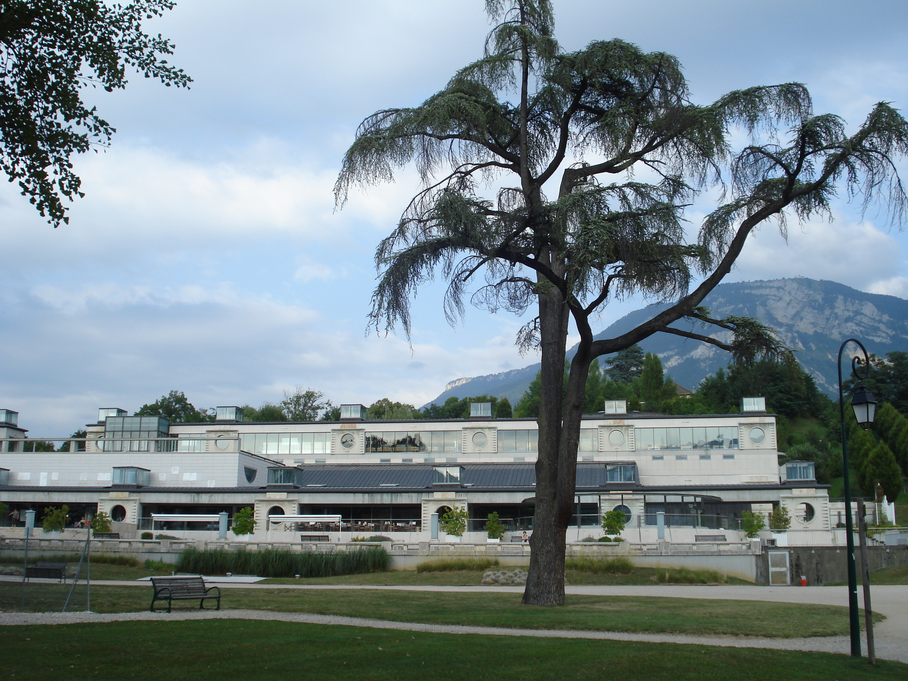 Les thermes Chevalley (Aix-les-Bains).